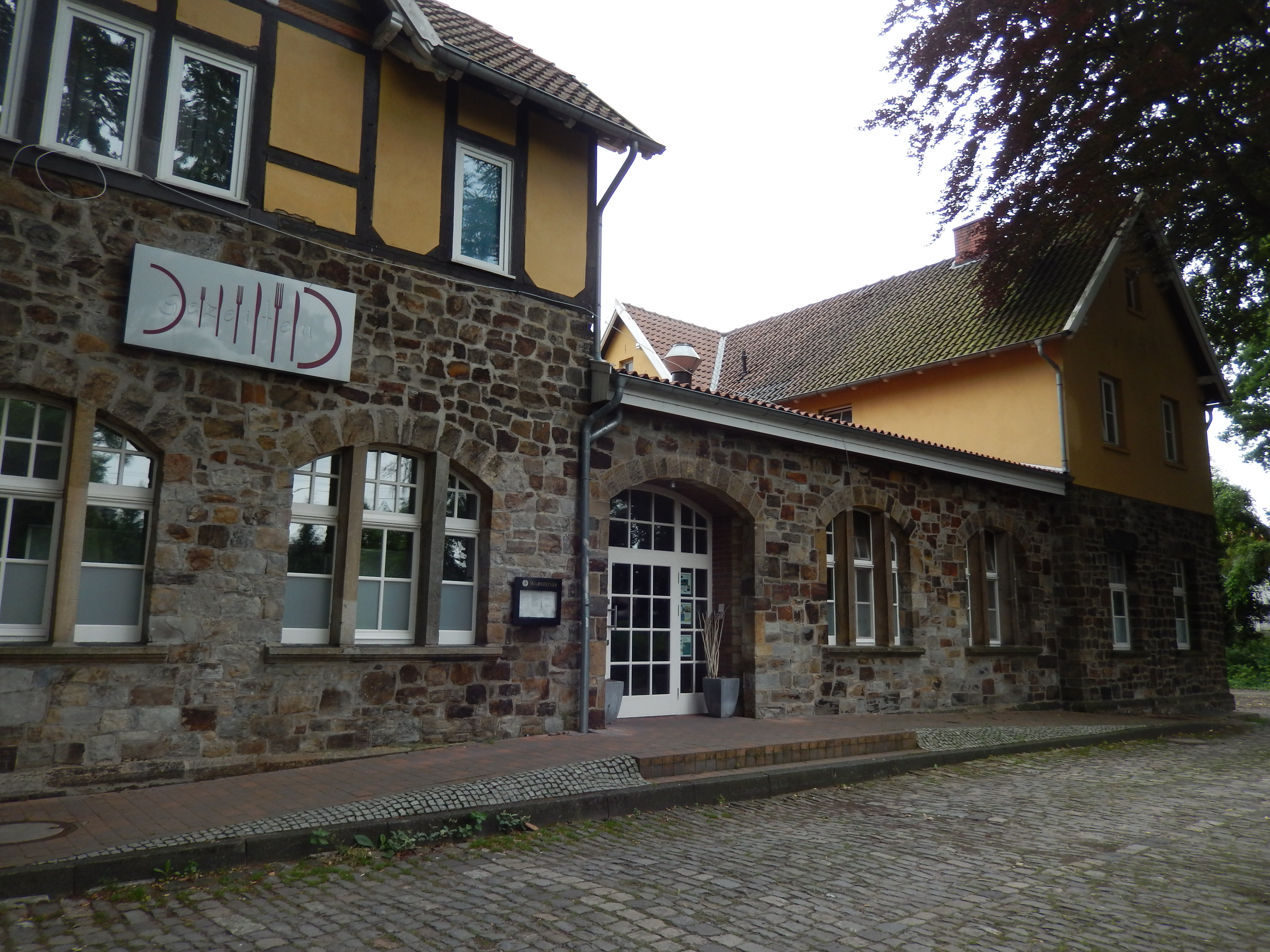 ehem. Bahnhofsgebäude Osnabrück-Eversburg, Restaurant Gezeiten